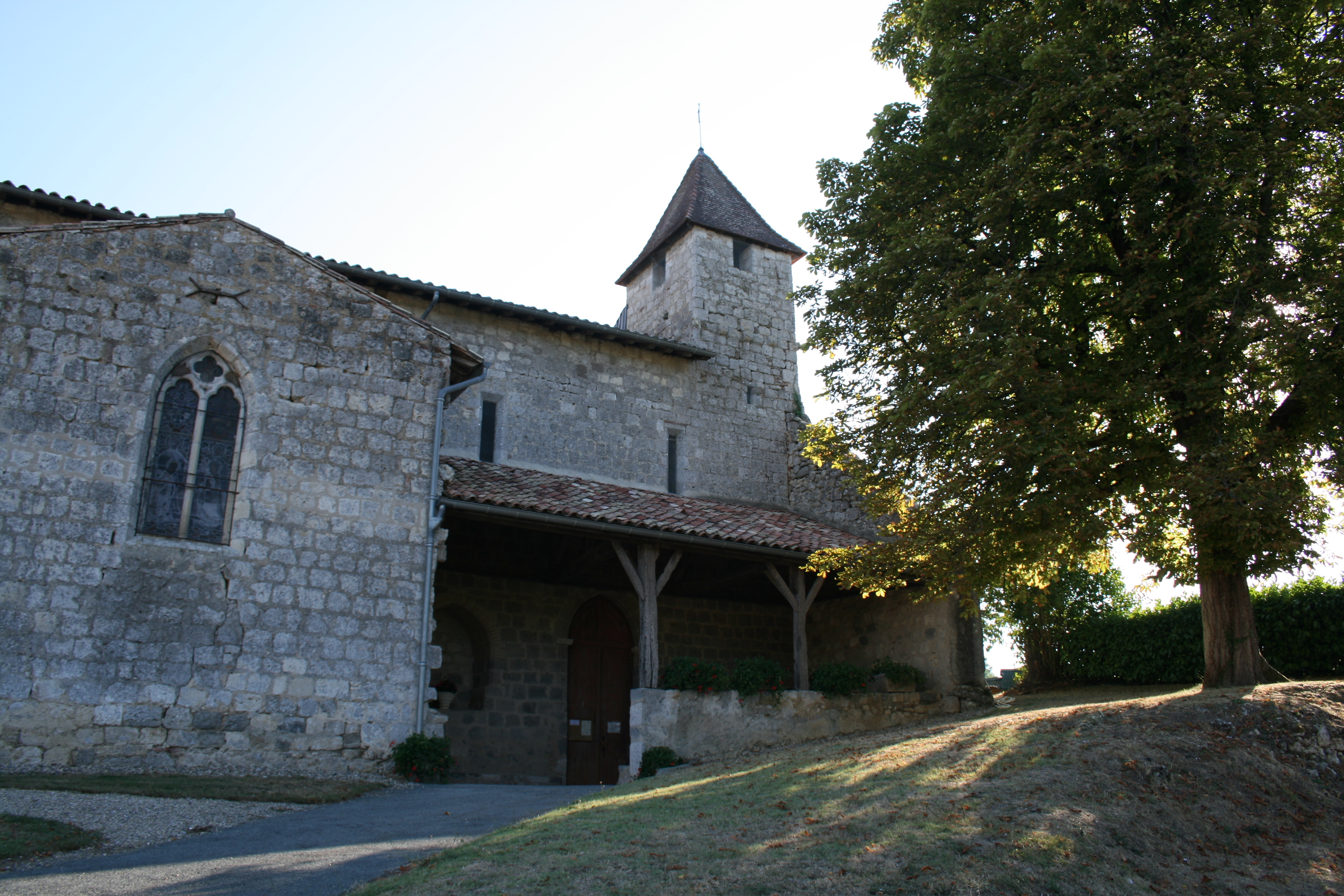 Eglise de Saint-Léon (47)